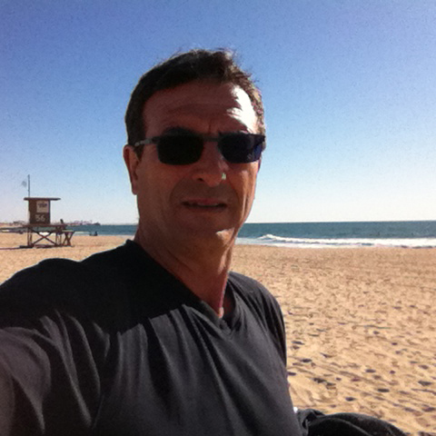 Paolo Ragosa.